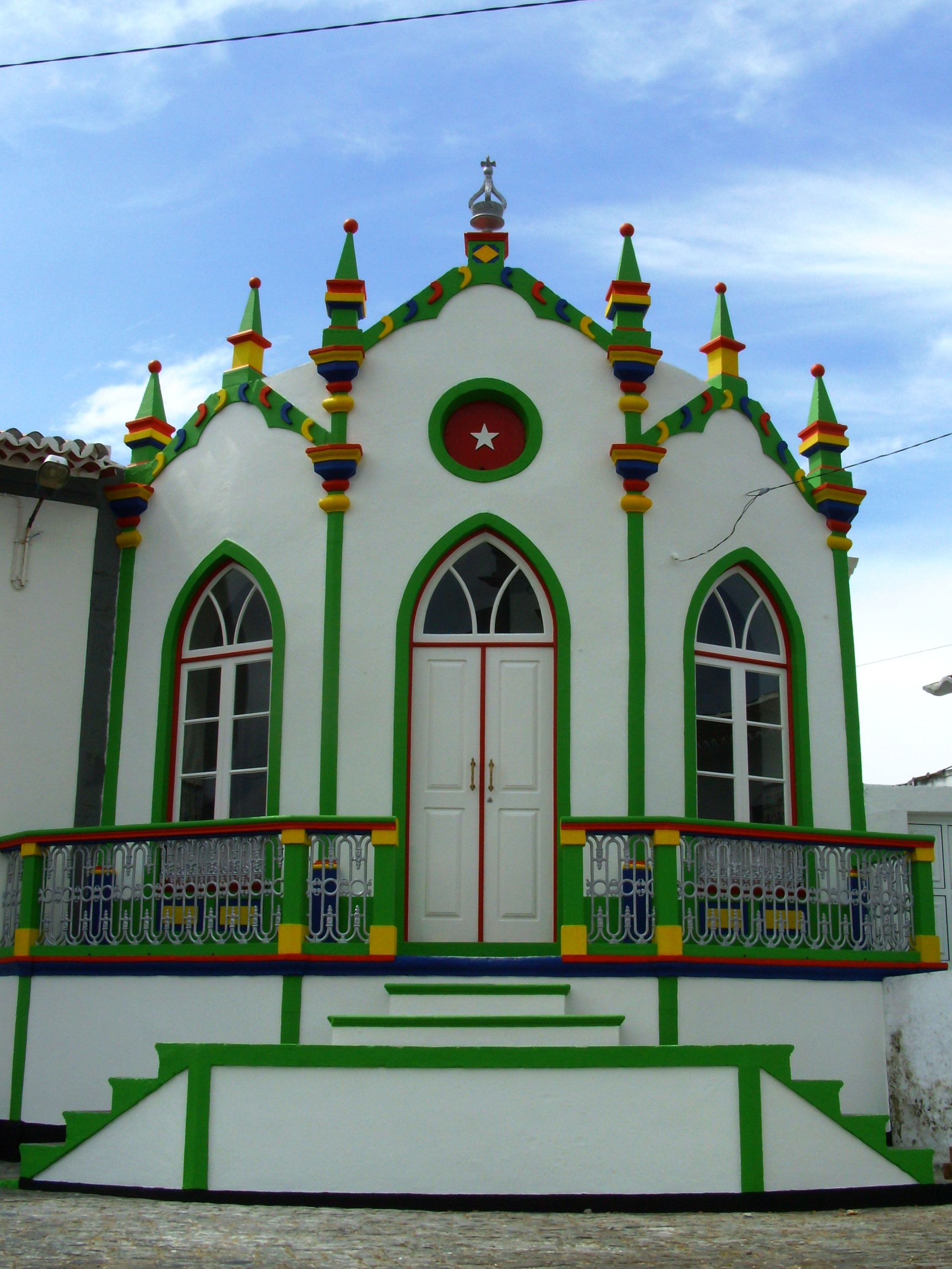 Império do Divino Espírito Santo da Serreta, freguesia da Serreta, Angra do Heroísmo, ilha Terceira, Açores.